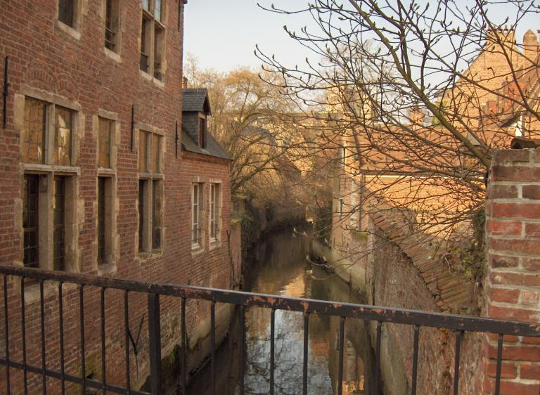 Kanaaltje in het Groot Begijnhof van Leuven.